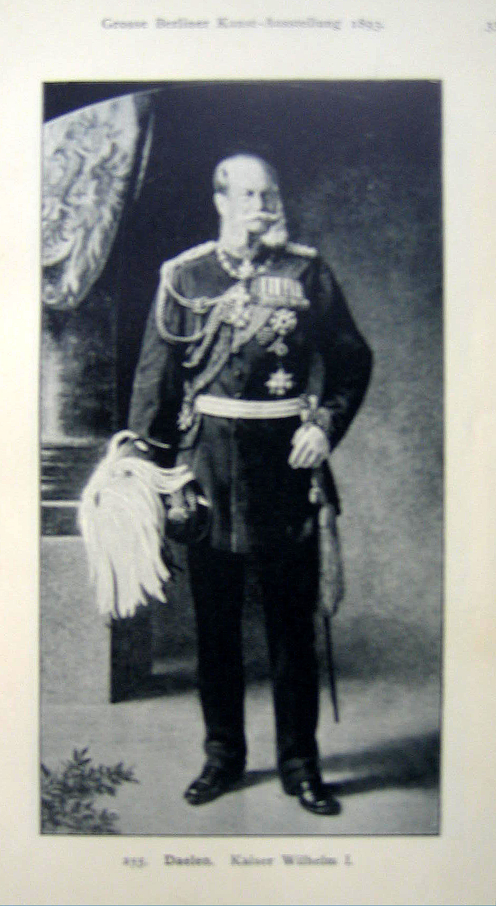 Bildnis Kaiser Wilhelm I. - Akadem. Kunstausstellung, Berlin